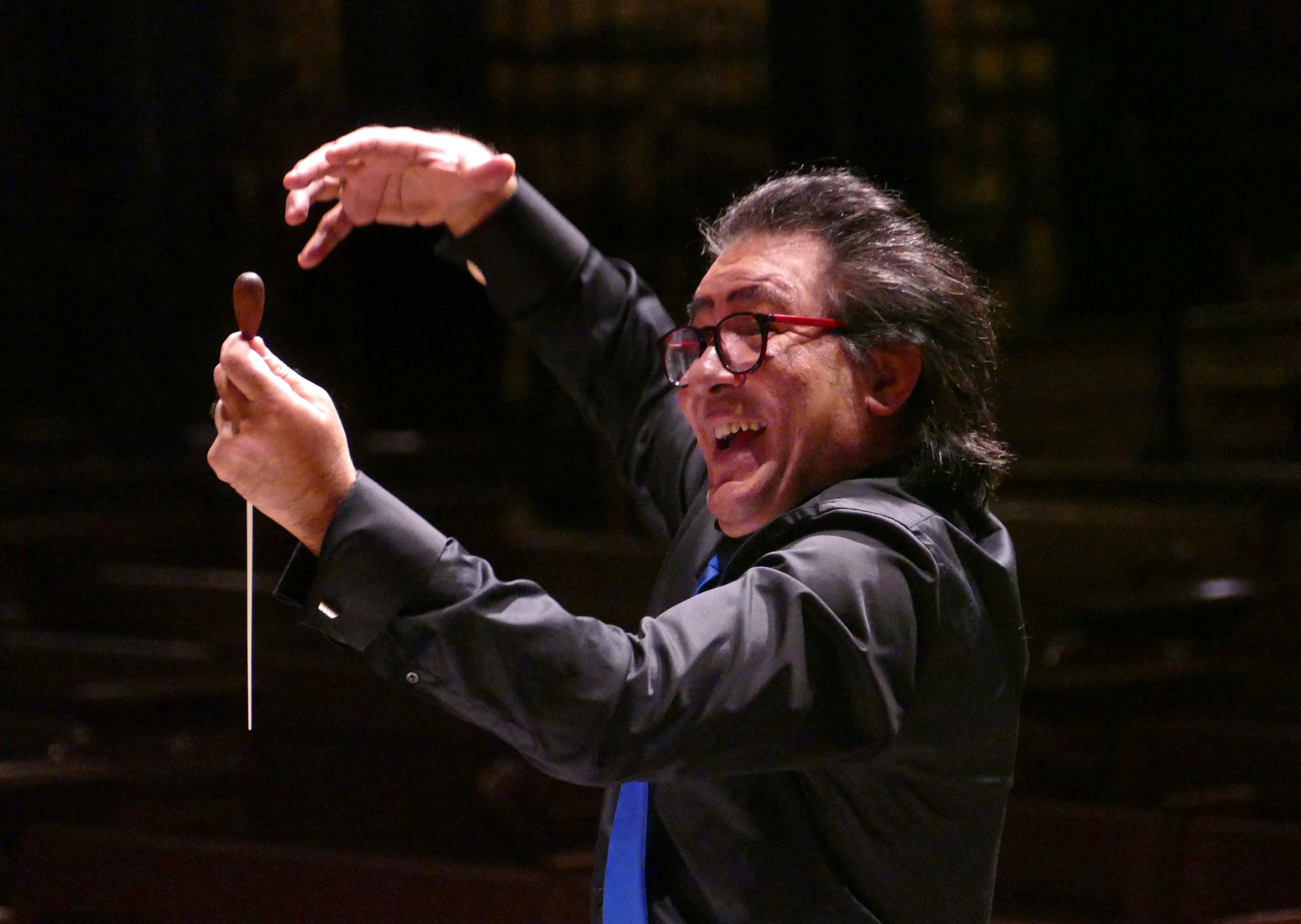 Riccardo M Sahiti ist künstlerischer Leiter und Dirigent der Roma und Sinti Philharmoniker.